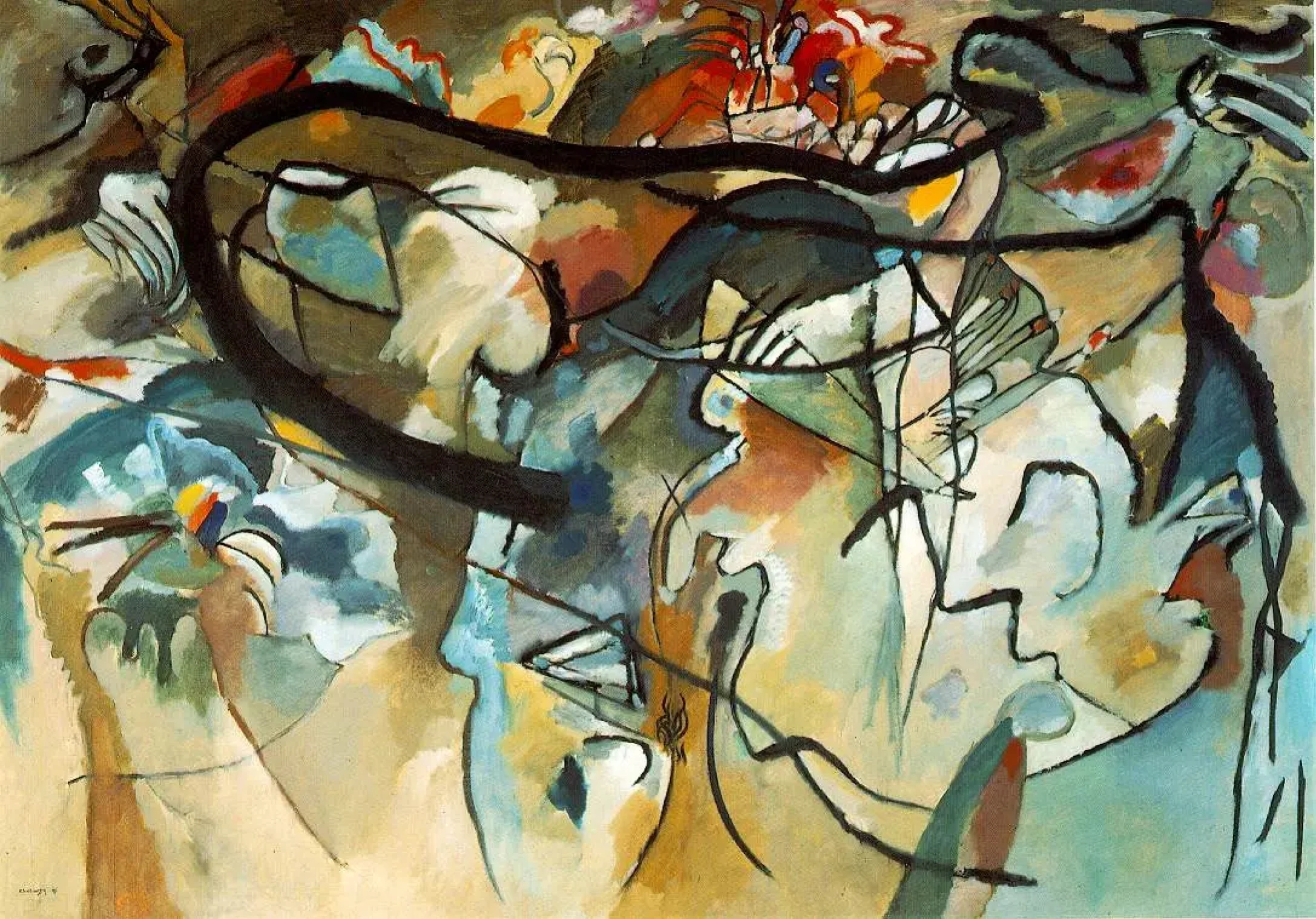 Wassily Kandinsky: Das jüngste Gericht/Komposition V, Privatbesitz, Maße 190 x 275 cm: Hans Konrad Roethel, Jean K. Benjamin: Kandinsky, Werkverzeichnis der Ölgemälde 1900–1915, Bd. I, London 1982, Nr. 400, S. 385